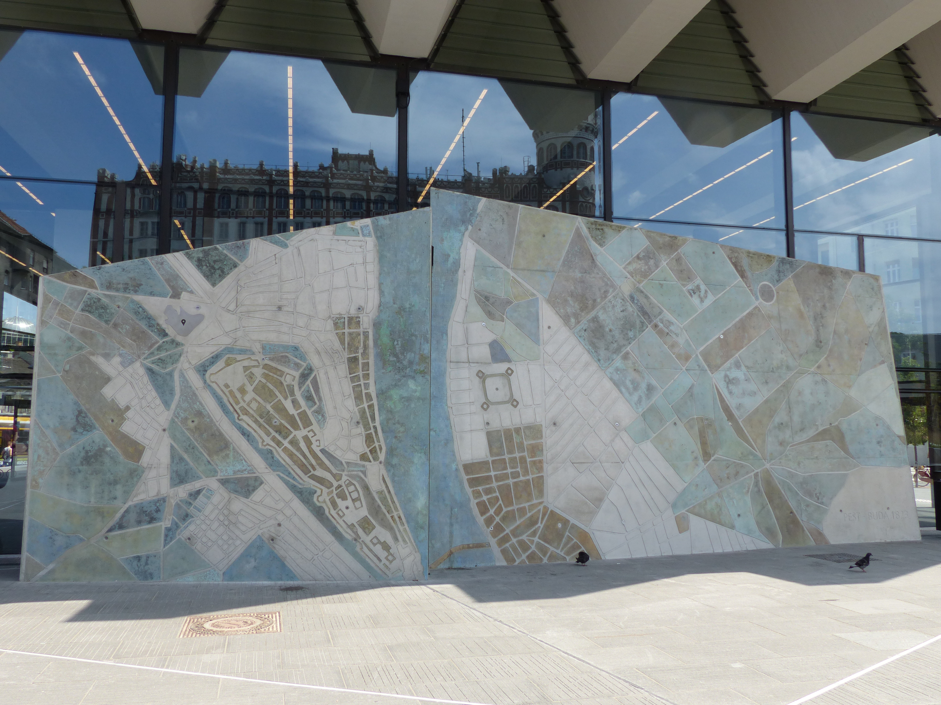 Pest-budai vaktérkép, Baróthy Anna (képzőművész). 2016. Pest-Buda 1823-as vaktérképét jeleníti meg. Az alkotás két szabálytalan alakú betonfalonból áll, amelyek egymástól síkban elfordulnak. Az egyik Budát, a másik Pestet ábrázolja, középen a Dunával (kozterkep). A felvétel 2016. június 21-én kedden készült Budapesten. Széll Kálmán tér, Budapest fal. (Budapest Wall). A fal a budapestiek találkozóhelye.